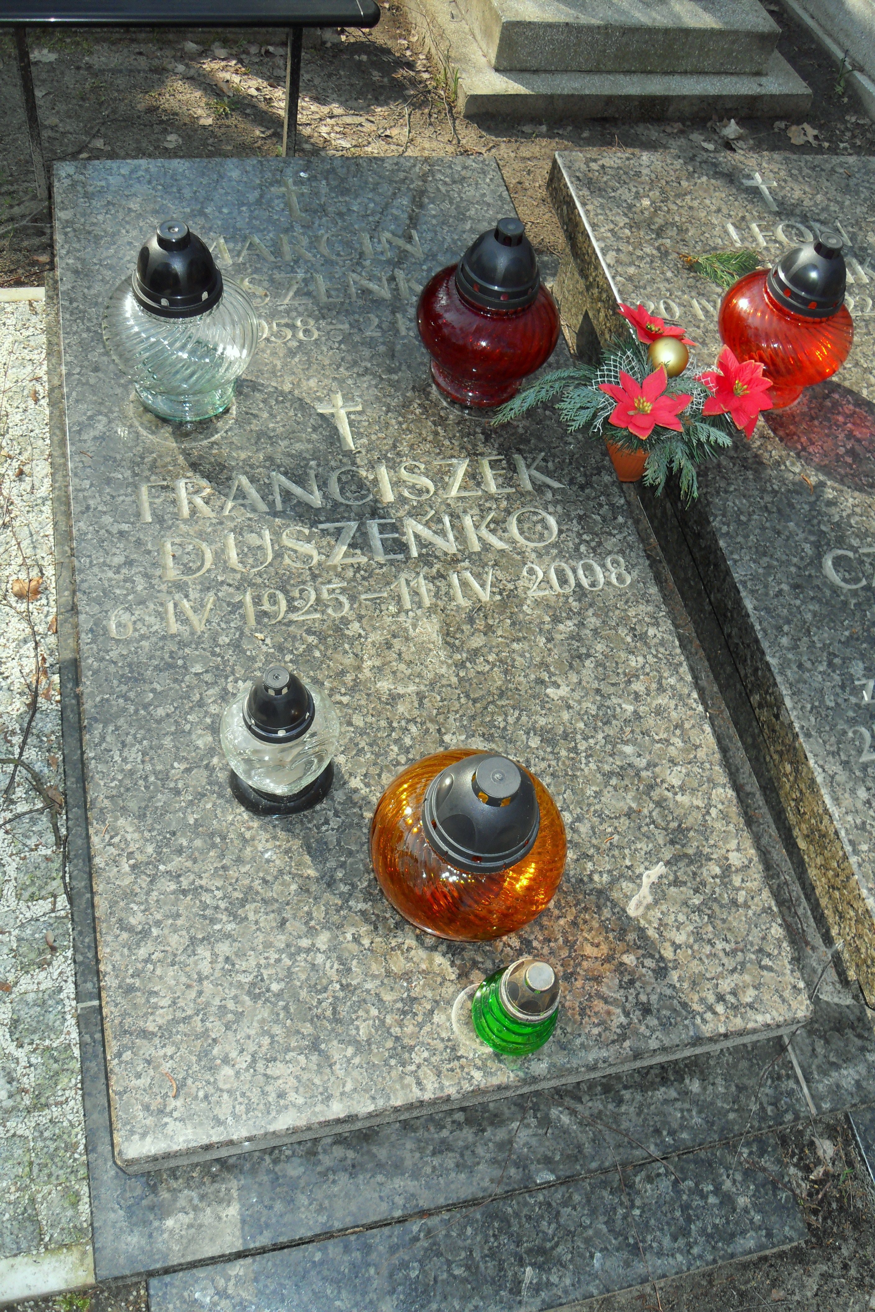 Gdańsk Wrzeszcz. Cmentarz Srebrzysko, grób Franciszka Duszeńki.